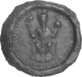 Drittes Kaisersiegel Konrads II. mit dem sogenannten Adlerszepter.